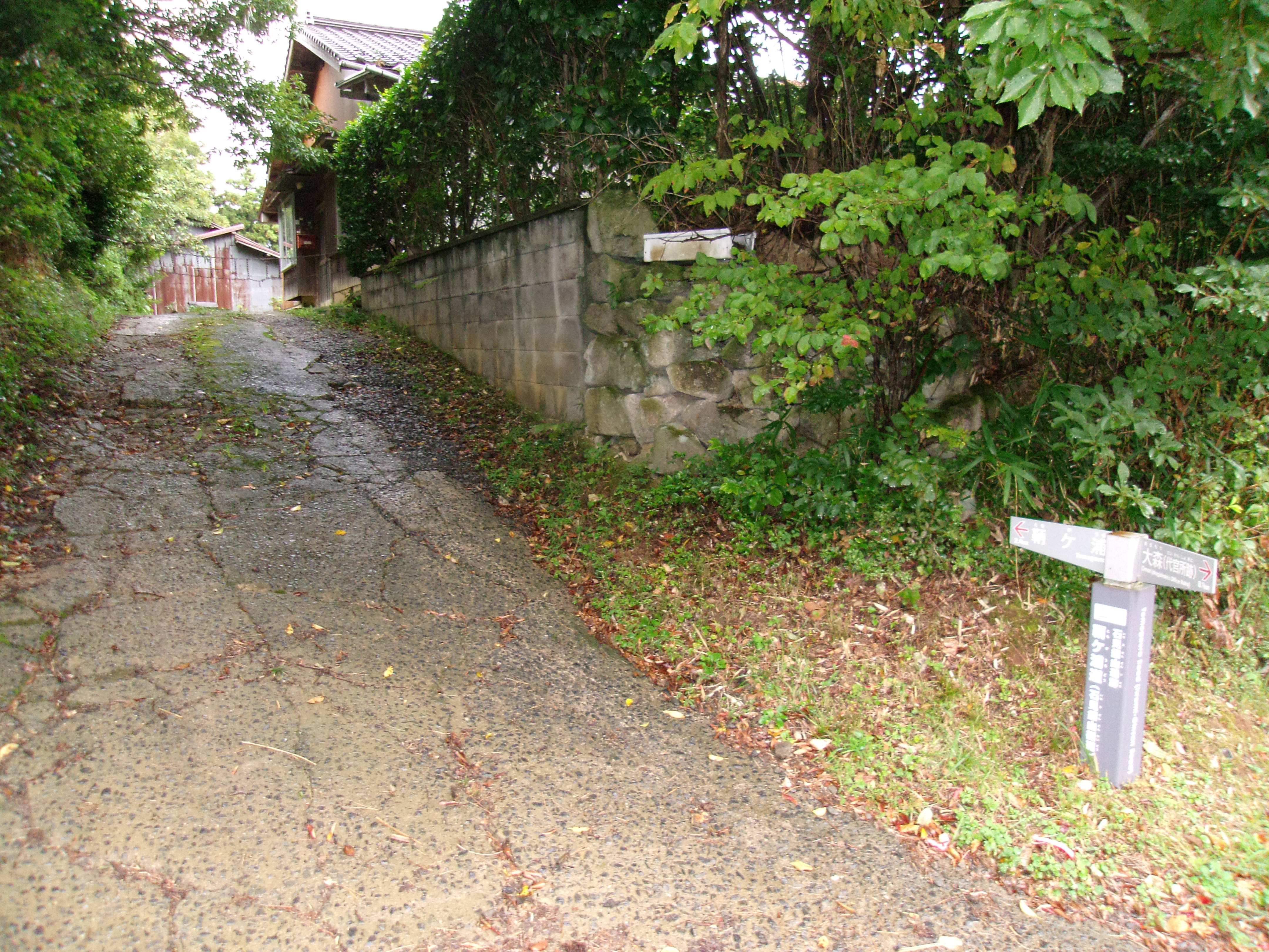 世界遺産「石見銀山」の構成資産である銀山街道鞆ヶ浦道 上野集落では個人宅内を通過するので一声かける